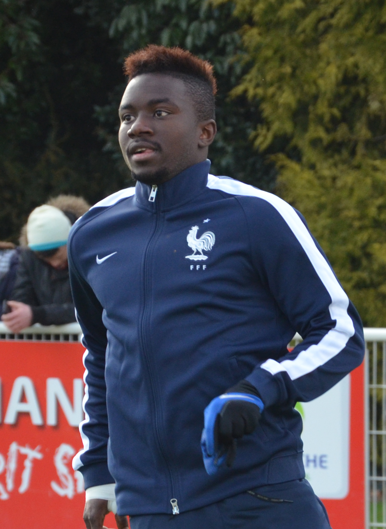 Photographie prise lors du match opposant la France à l'Angleterre pour les qualifications du championnat d'Europe de football des moins de 19 ans 2015 au stade Louis-Villemer de Saint-Lô le 31 mars 2015. Ici, Ulrich N'Nomo.